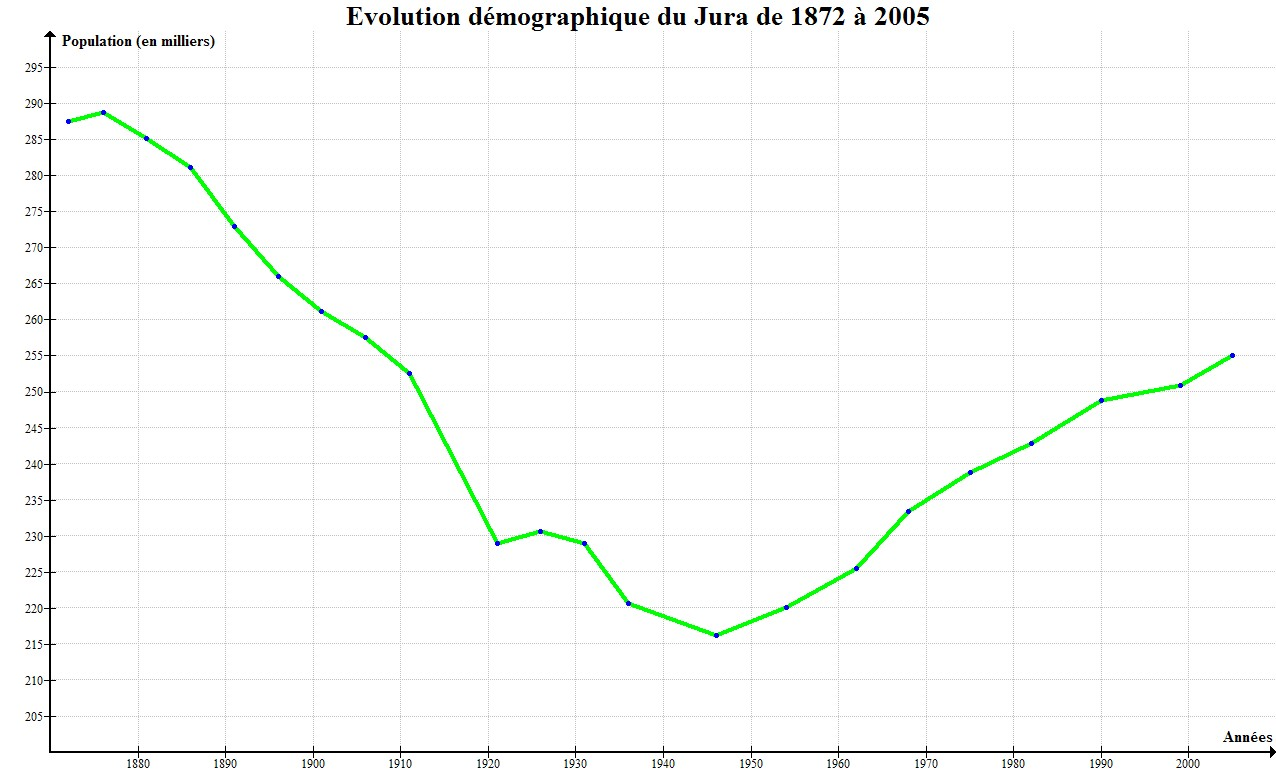 Courbe montrant la croissance de la population du département du Jura entre 1872 et 2005